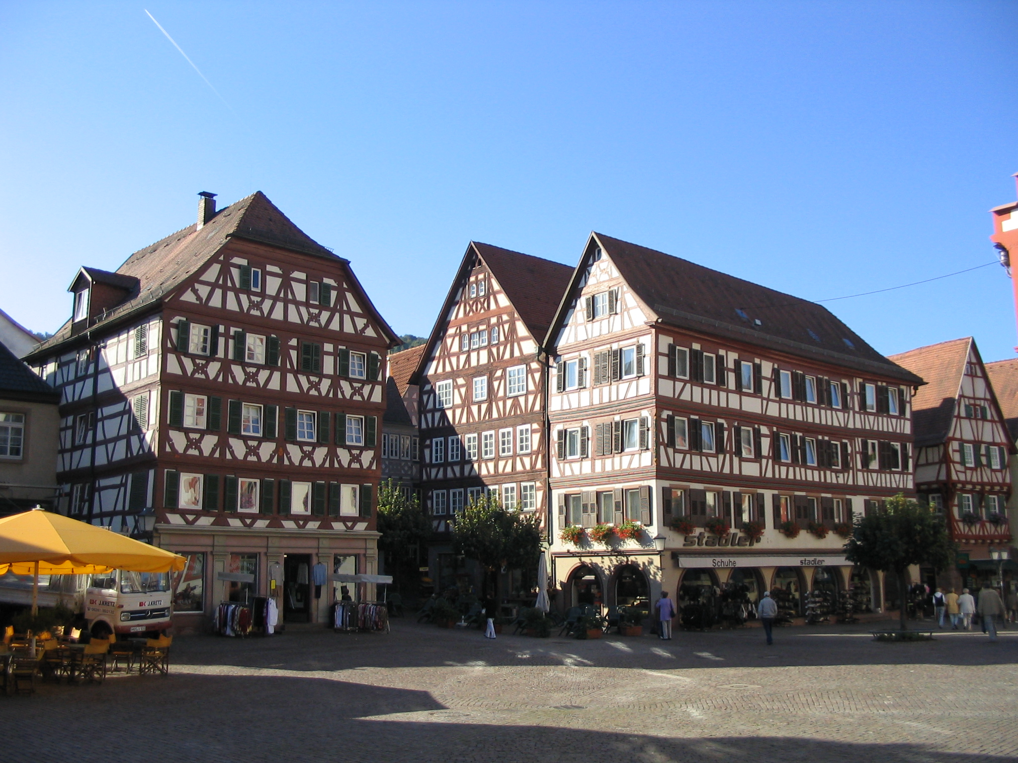 Fachwerkhäuser am Marktplatz in Mosbach